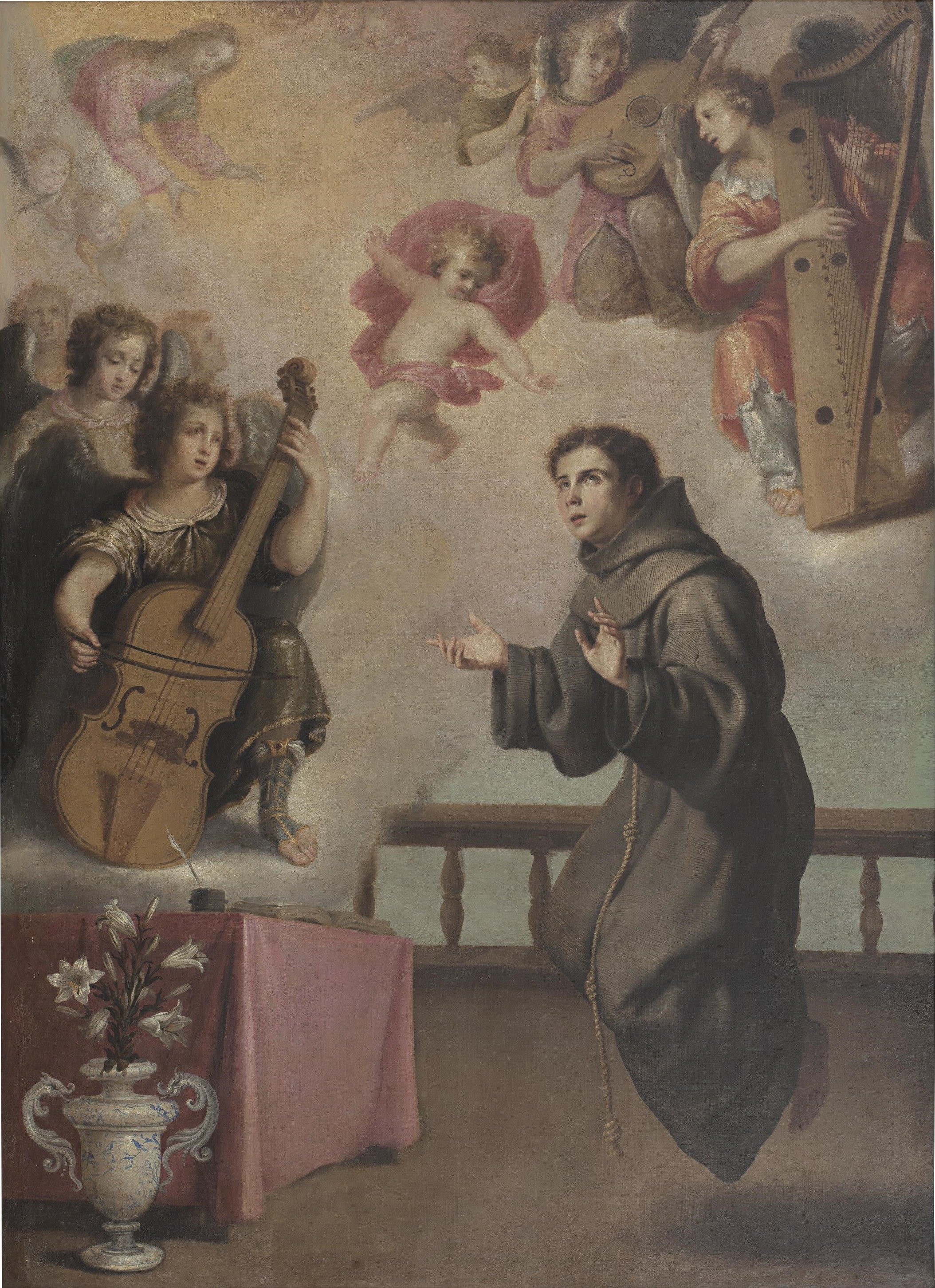 La obra representa a San Antonio de Padua.